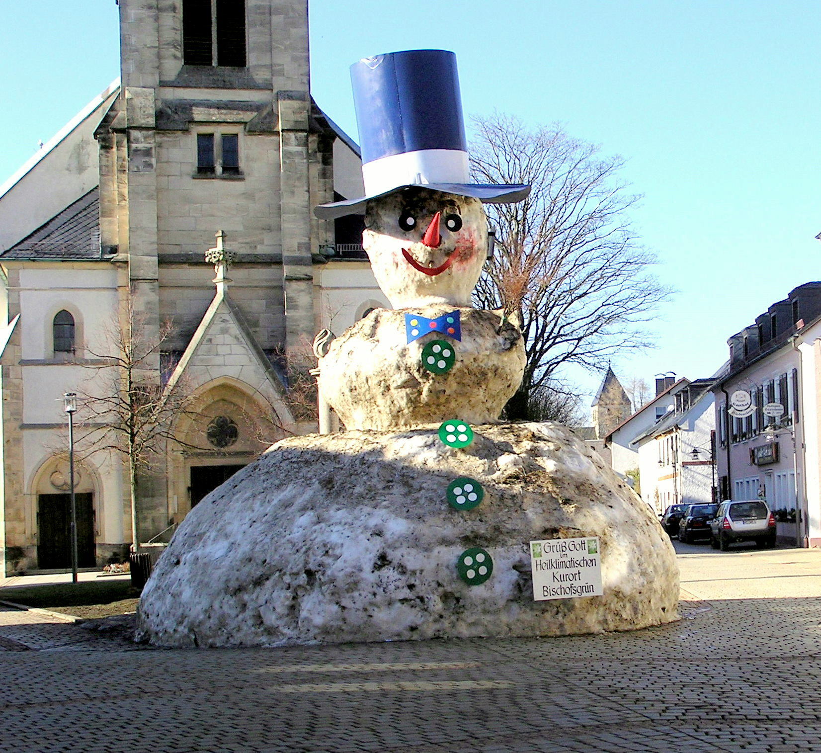 Matthäuskirche (Bischofsgrün), Schneemann, 2007